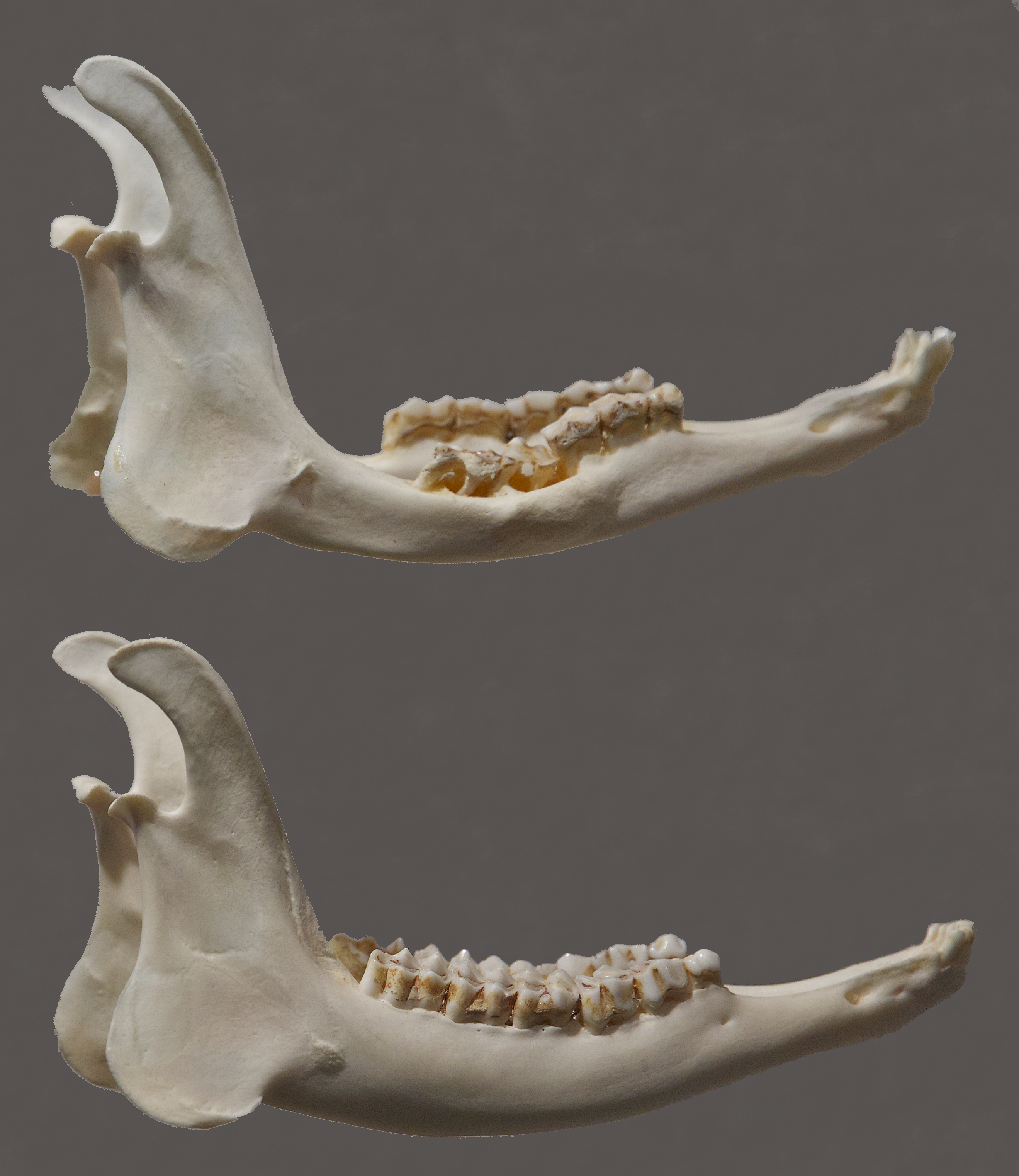 Unterkiefer eines Rehs mit Paradentose im Vergleich eines Unterkiefers eines sechsjährigen Rehs. Ausstellungsstück im Naturmuseum Olten.